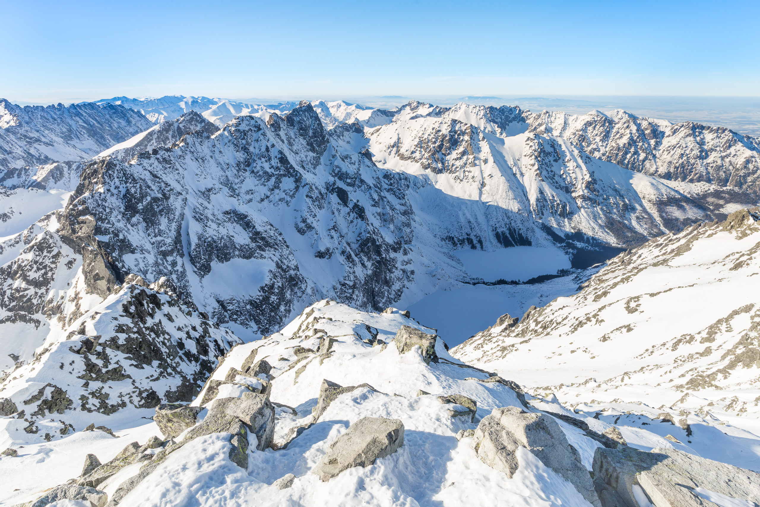 Rysy, Tatry. Widok na Czarny Staw i Morskie Oko This is a photography of protected area with CRFOP ID PL.ZIPOP.1393.N2K.PLC120001.B